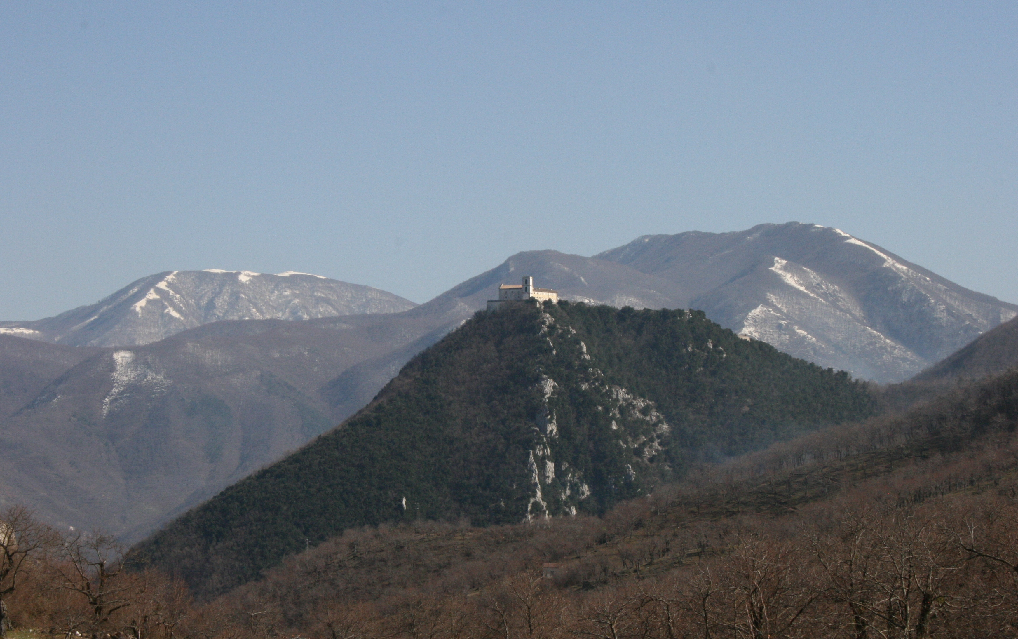 Il Santuario del Santissimo Salvatore a Montella visto dal Monte Sassosano.